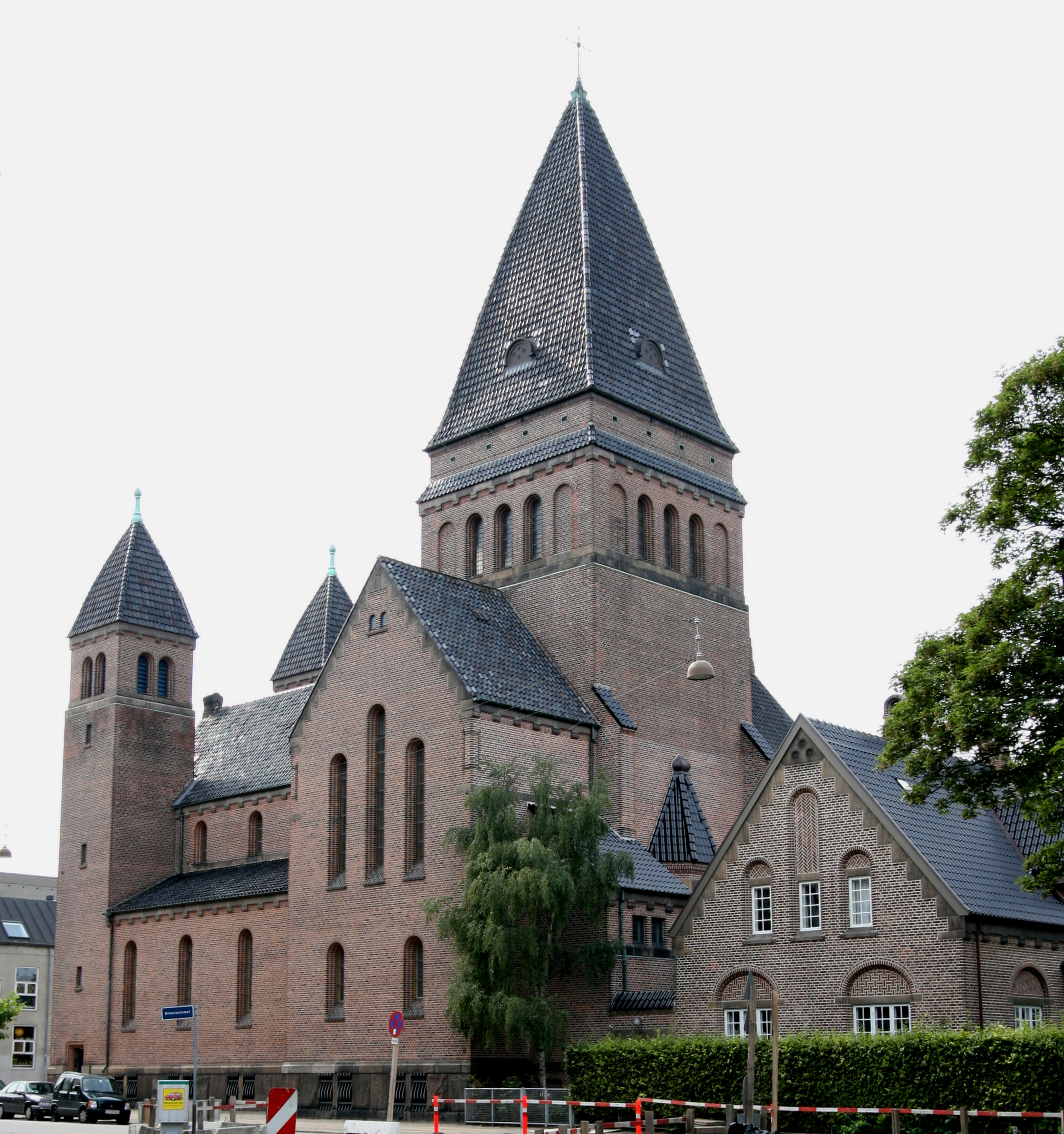 Esajas Kirke in Copenhagen, Denmark.